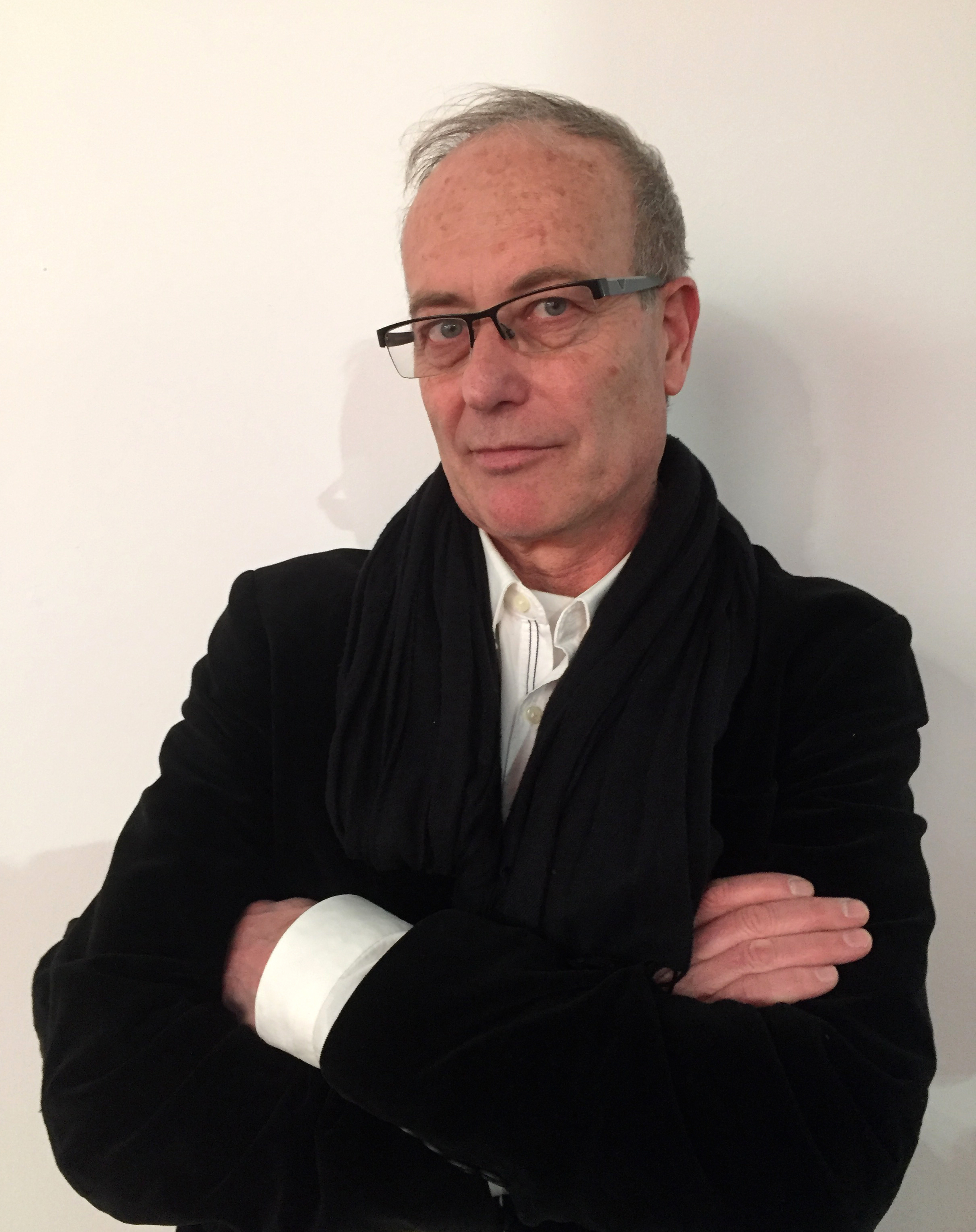 En la inauguración de la Feria de Arte Contemporáneo de Madrid ARCO 2019